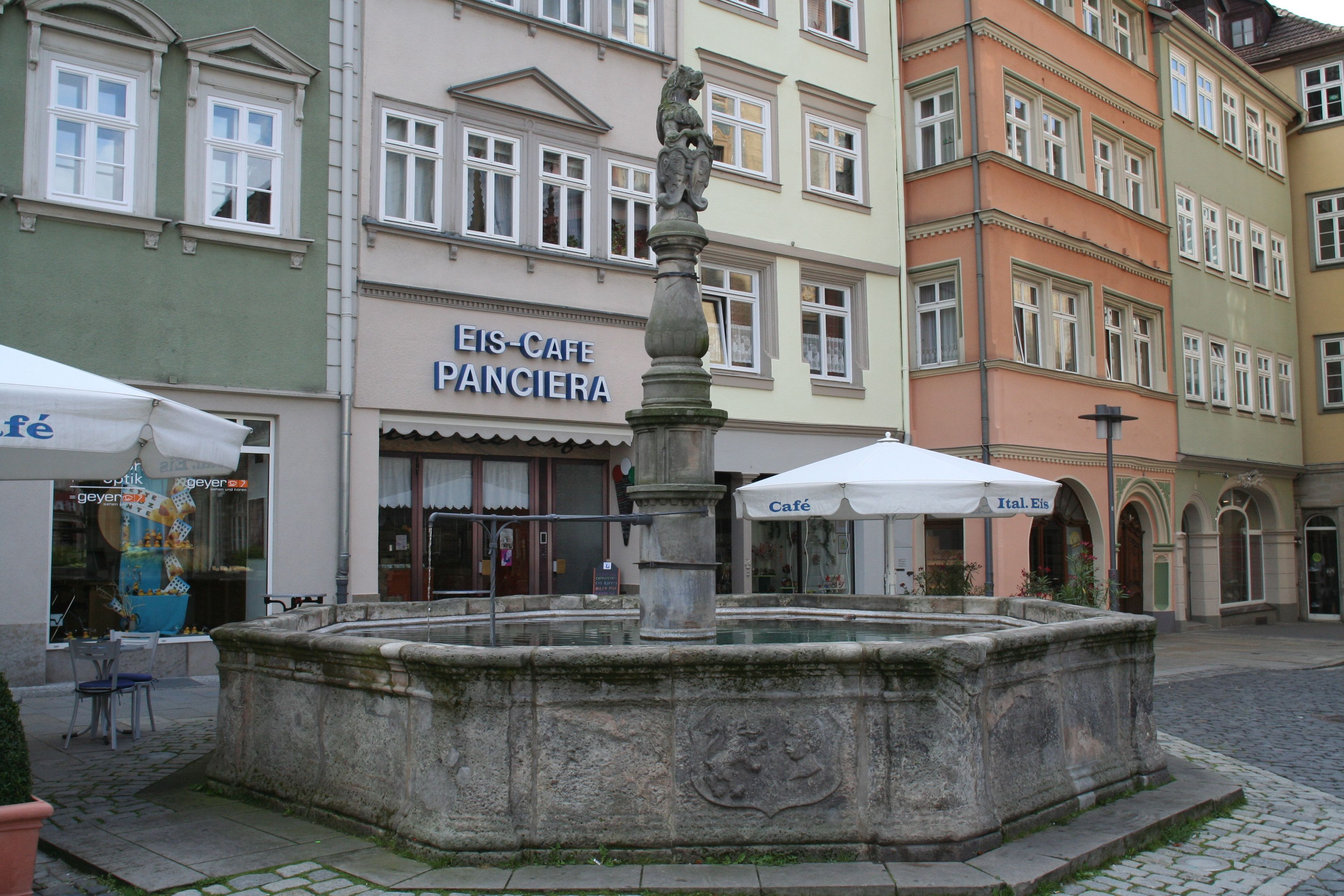 Marktplatz in Coburg, Brunnen vor der Ketschengasse